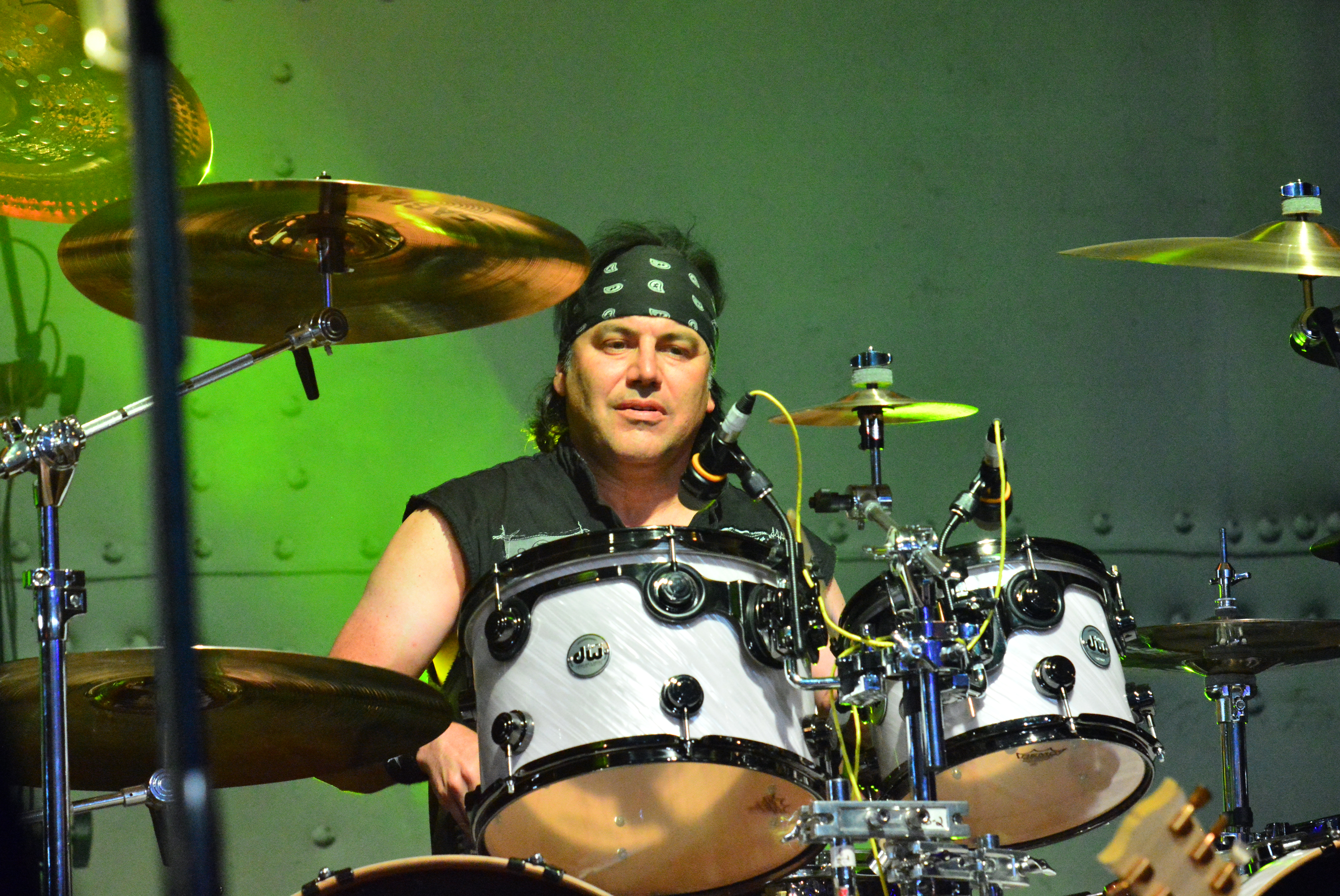 Black Star Riders beim Wacken Open Air 2014